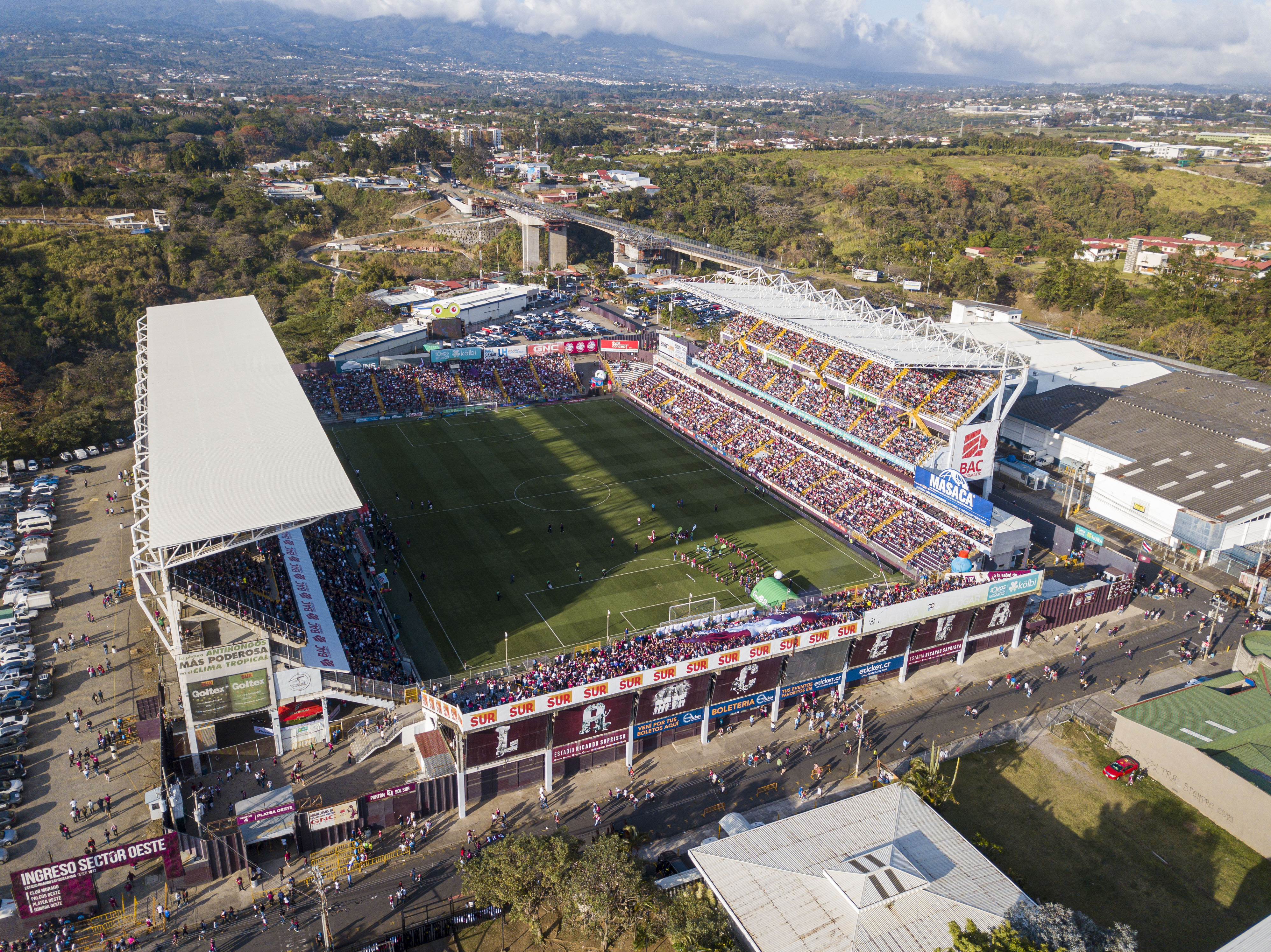 El Estadio Ricardo Saprissa, también llamado La Cueva, antes de un clásico nacional a reventar.